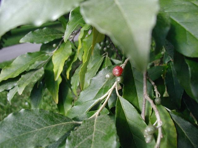 Elaeagnus umbellata